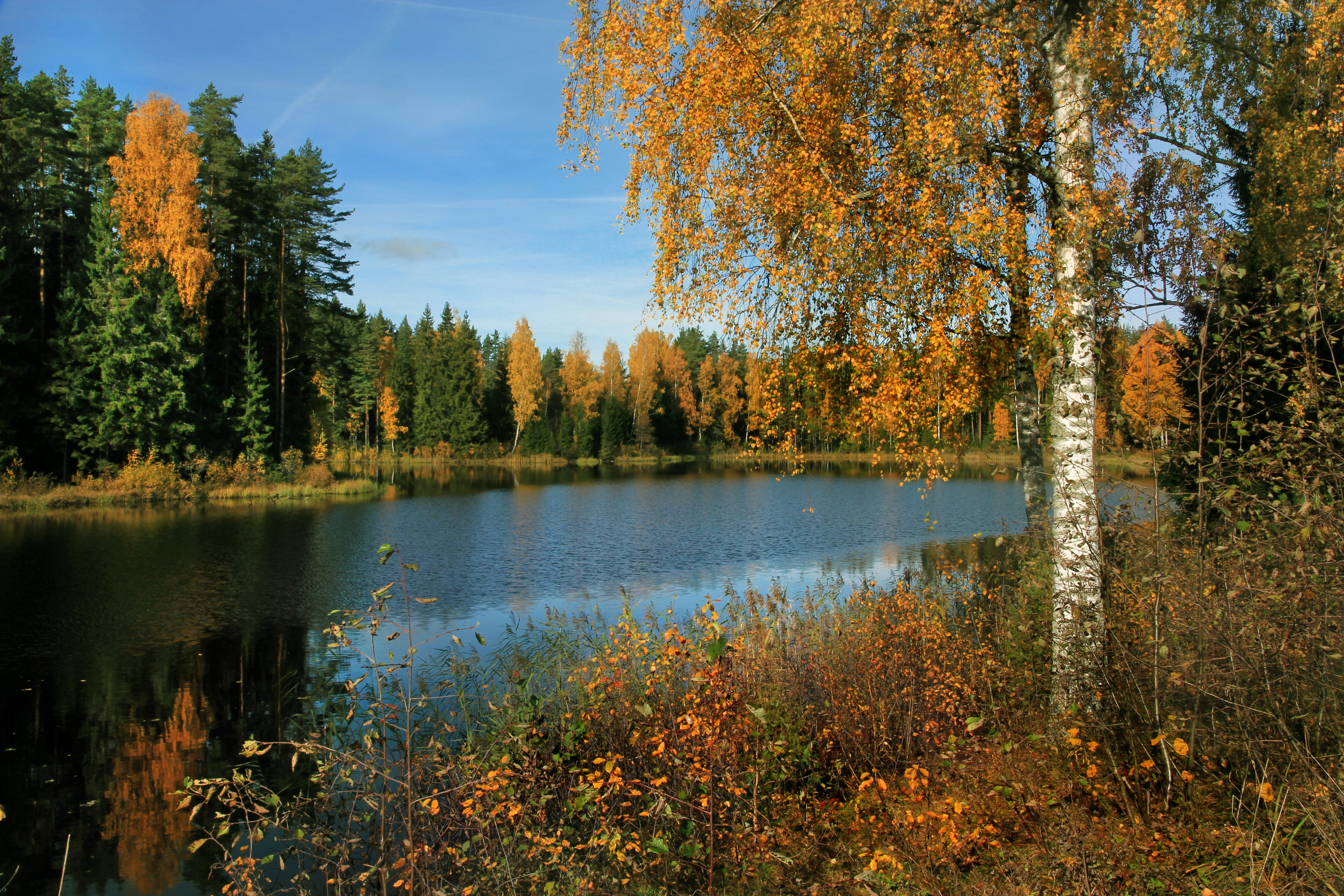 Väikene Saarjärv, Antsla vallas